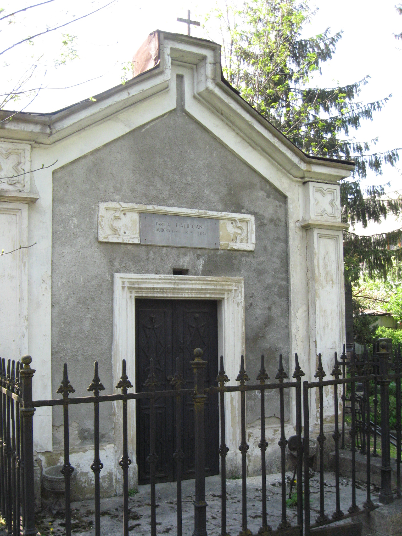 Iuliu Haţieganu sírja a kolozsvári Házsongárdi temetőben. 254